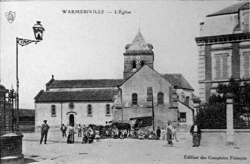 l'église st-Martin de la ville.